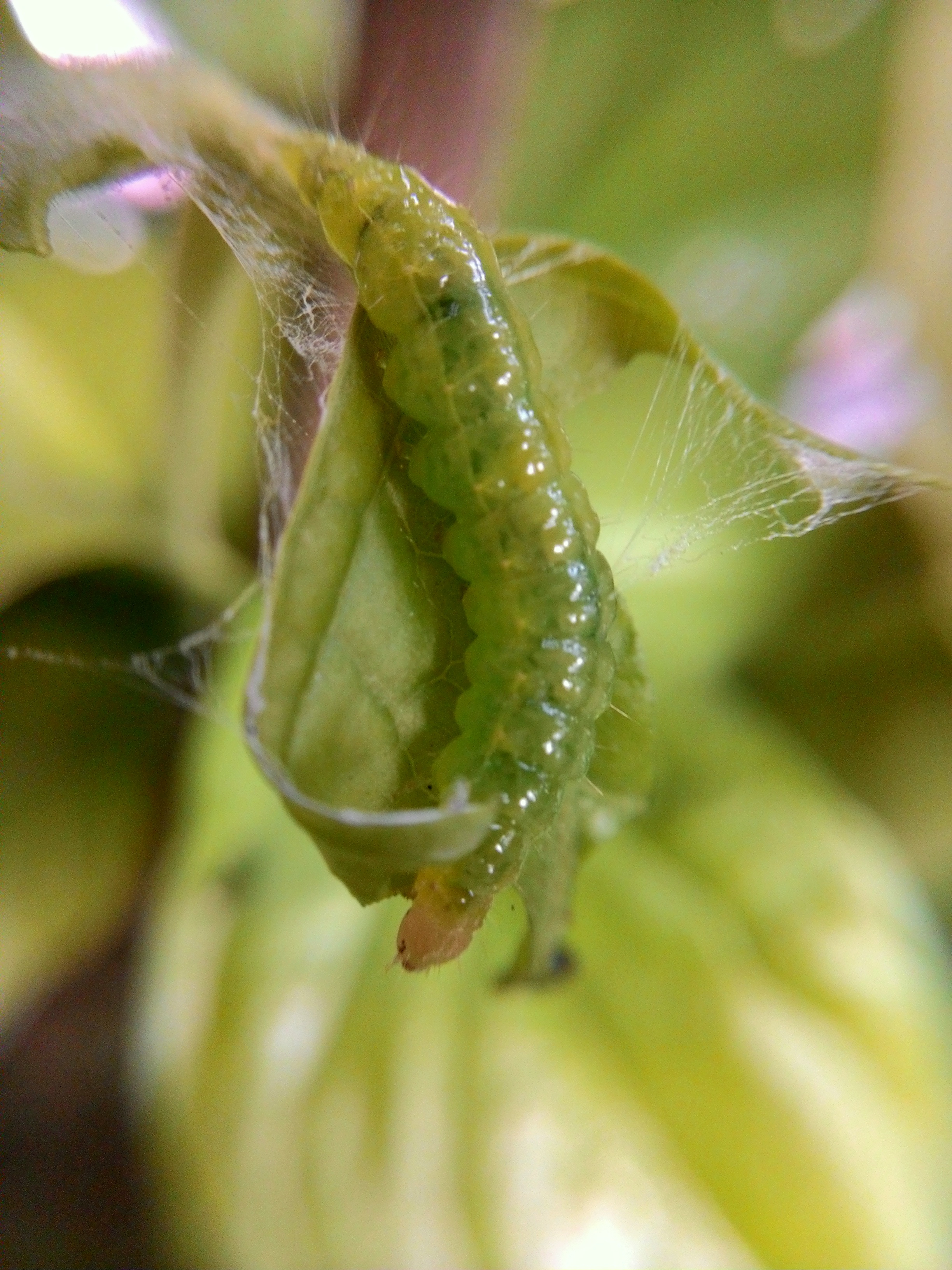 Ulat Palpita adalah sejenis larva dari ngengat berwarna putih. ulat ini merupakan hama tanaman bunga melati. Ulat ini memakan daun melati terutama bagian pucuk atau daun muda.